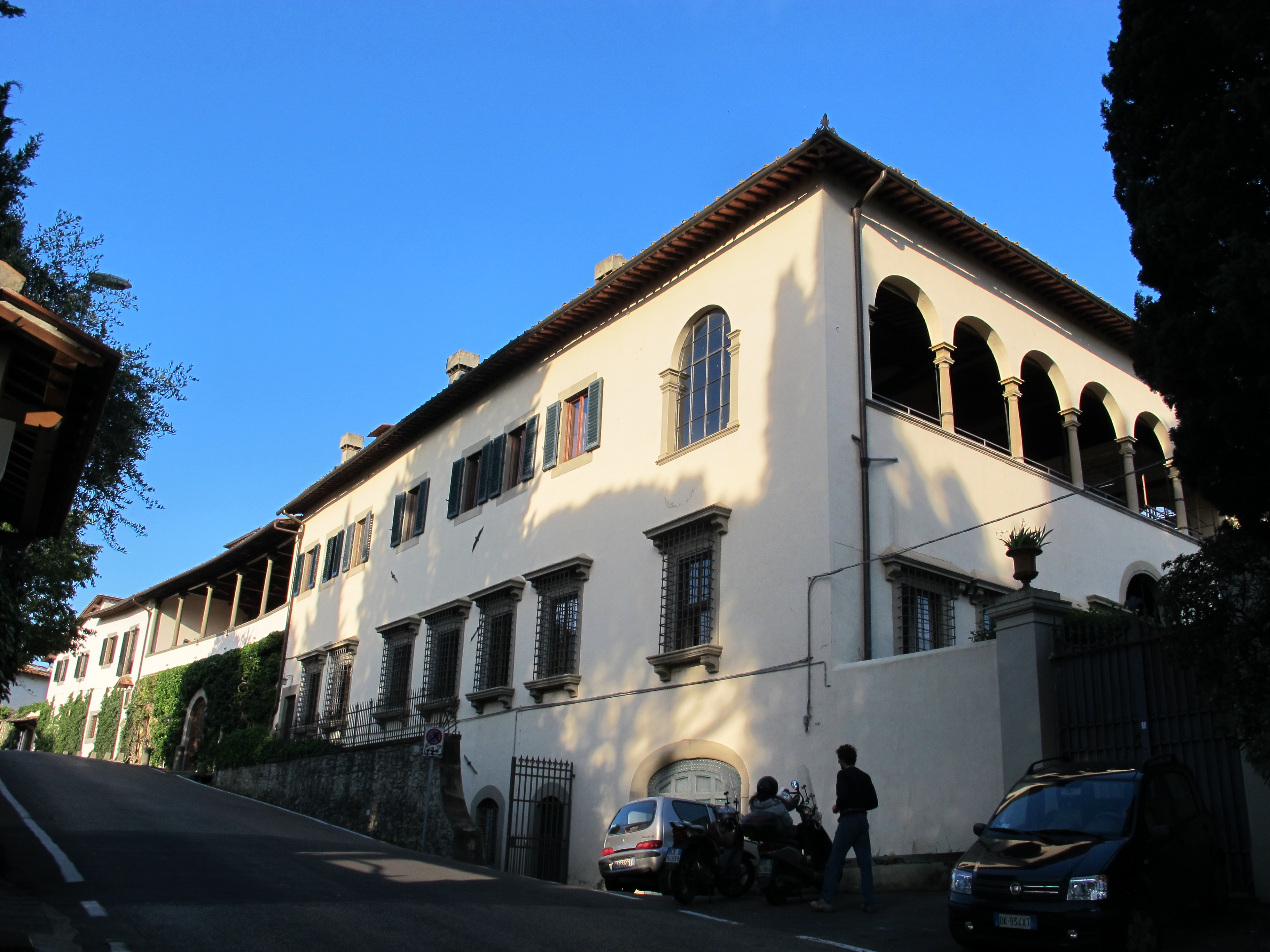 Villa marsilio ficino